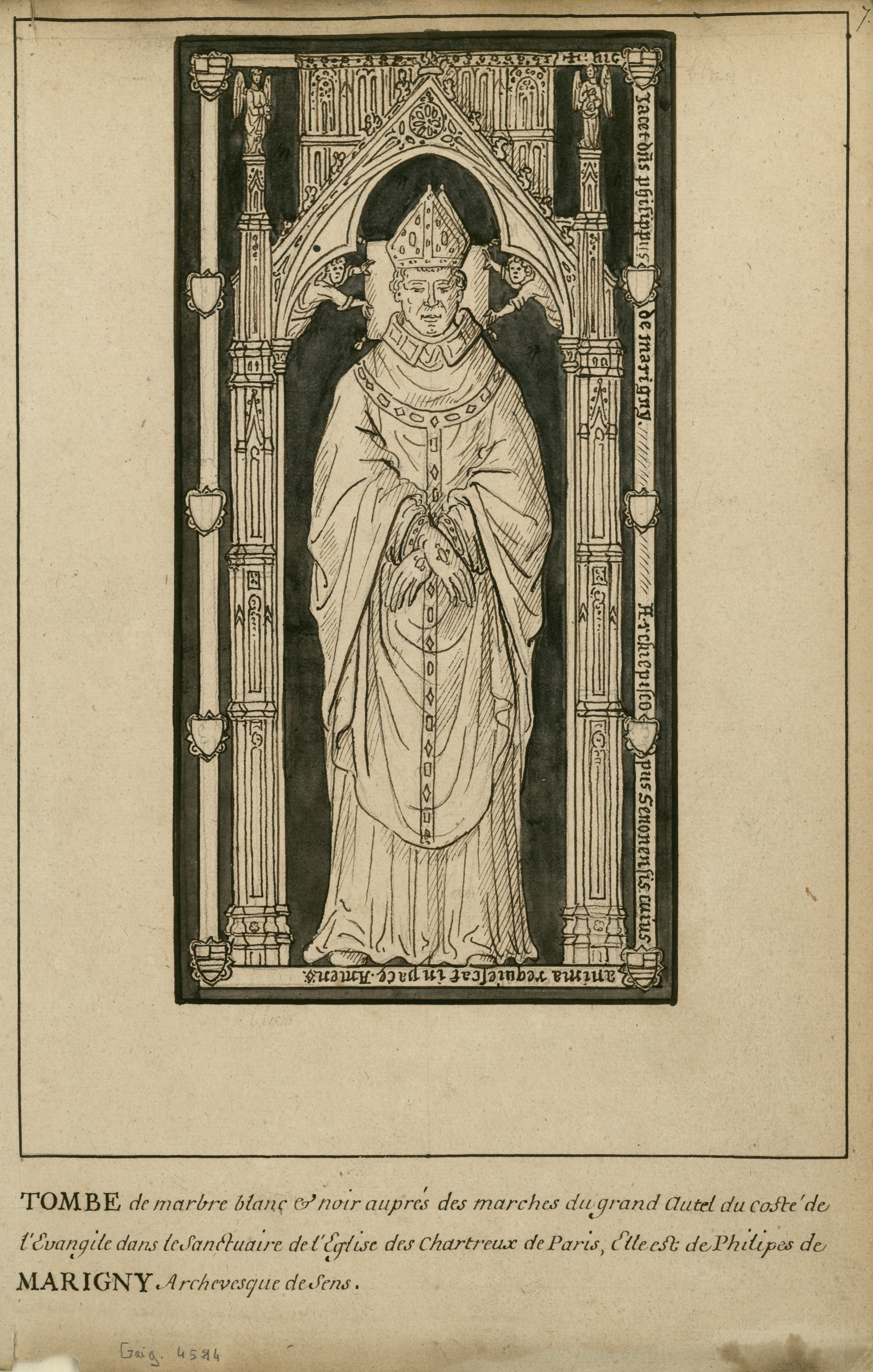 Pierre tombale en marbre noir et blanc, sur laquelle est représentée l'effigie d'un prélat dans un encadrement gothique